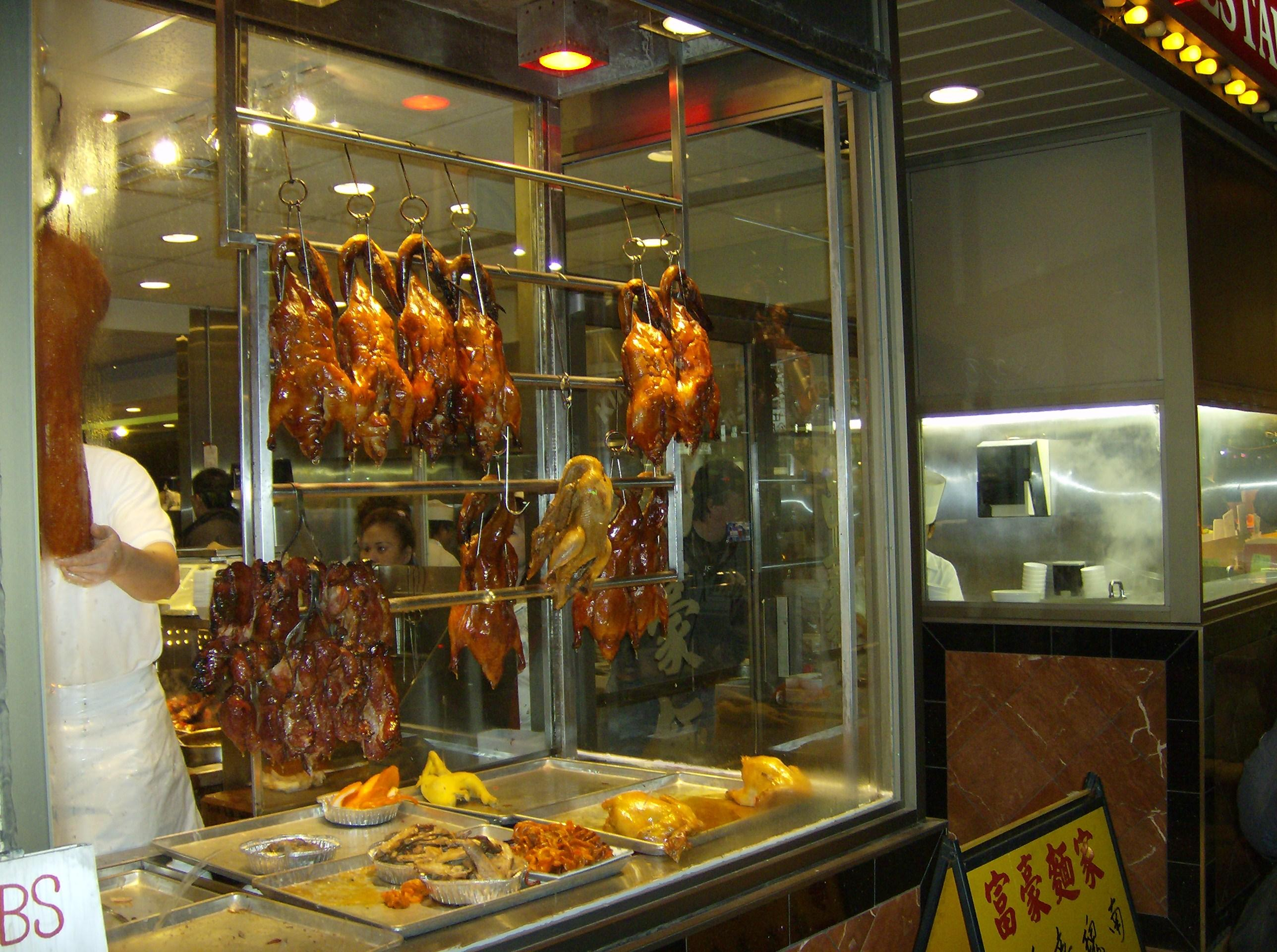 self made